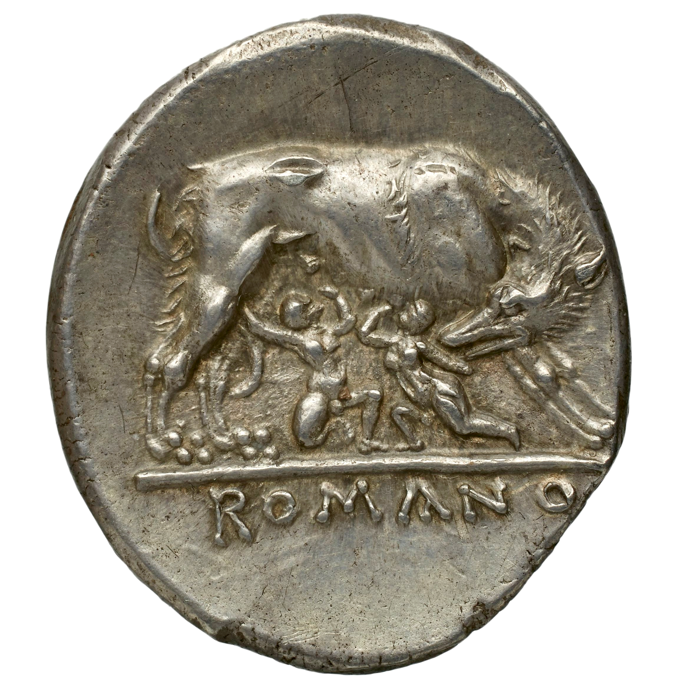 Didrachme anonyme, argent 7,25 gr. Rome : 264-255 av. J.C. Revers : ROMANO (aux romains) La Louve allaitant Romulus et Remus (peut-être la statue érigée par Quintus Ogulnius devant le Ficus Ruminalis vers -290) . Collection BnF REP-1364